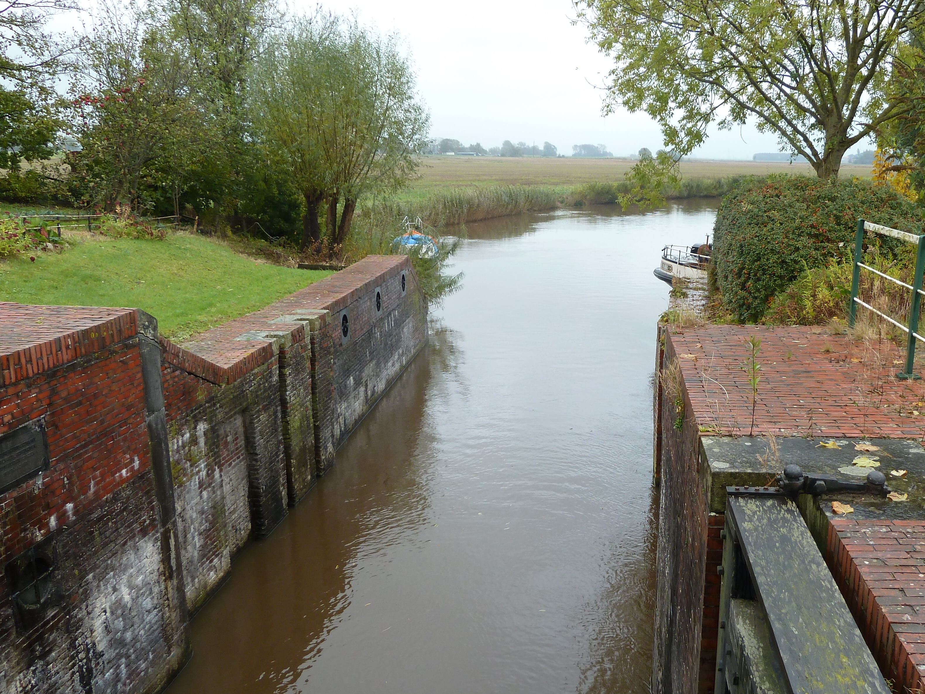 Gezicht op de Kromme Raken vanaf de Schouwerzijl in de richting van het zuidoosten (richting Reitdiep).